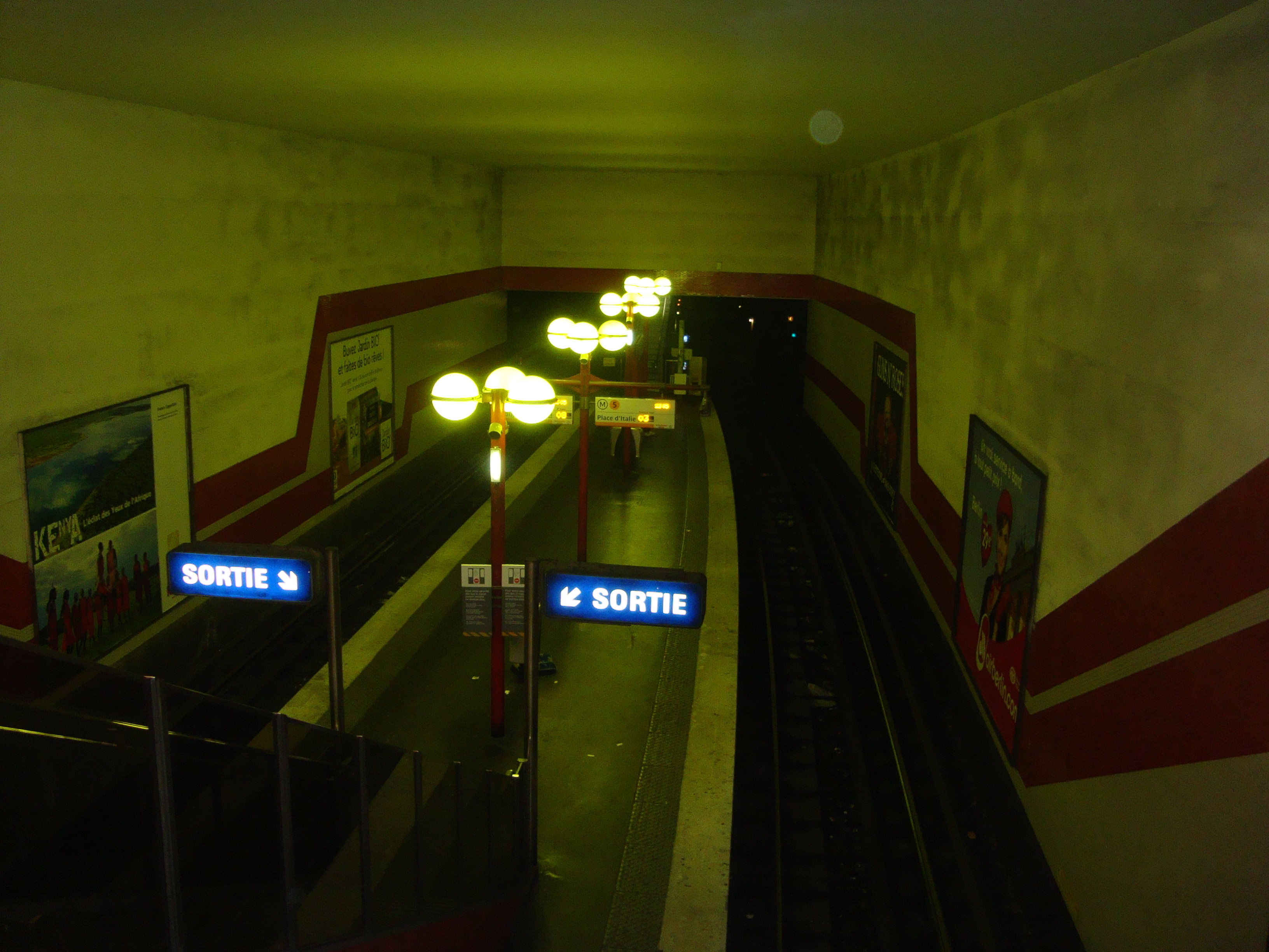 Le quai central de la station de métro de ligne 5 Bobigny - Pantin - Raymond Queneau vu de la mezzanine.